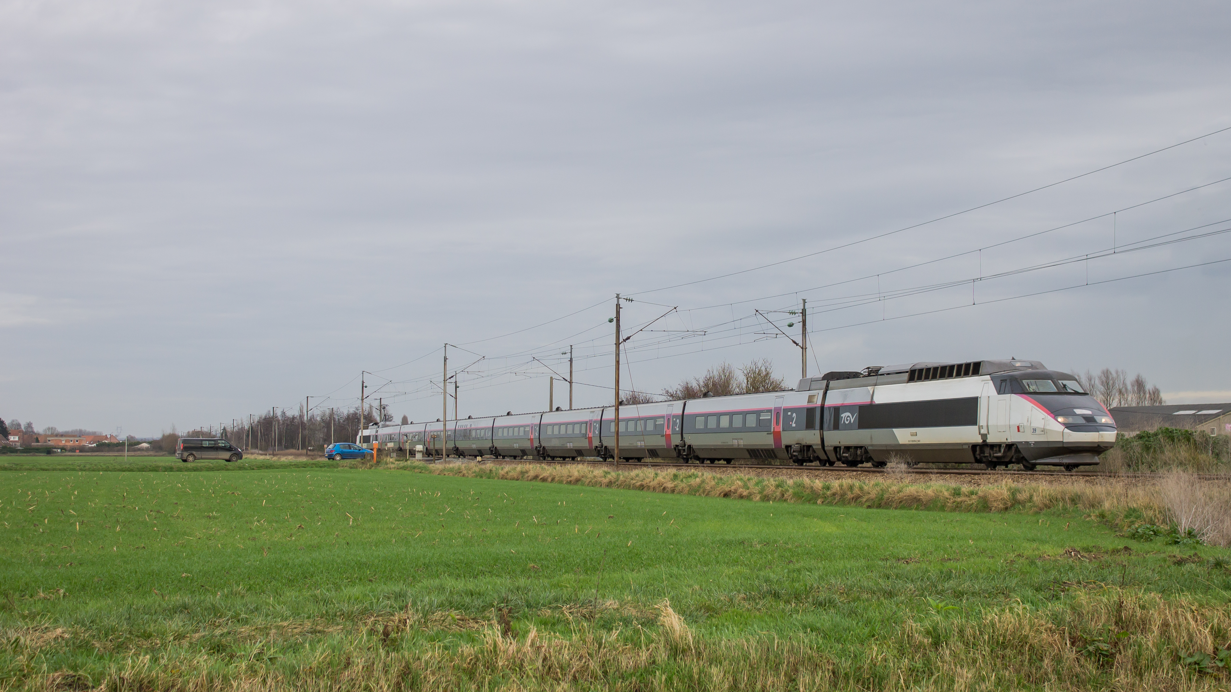 De SNCF is druk bezig de overgebleven 65 treinstellen type TGV Sud-Est een laatste revisie te geven. Deze treinstellen komen uit de begintijd van de TGV, en gaan dus al heel wat jaartjes mee. Treinstel 39 is hier als TGV 7336 onderweg naar Arras en Paris Nord, als deze net uit Hazebrouck is vertrokken.